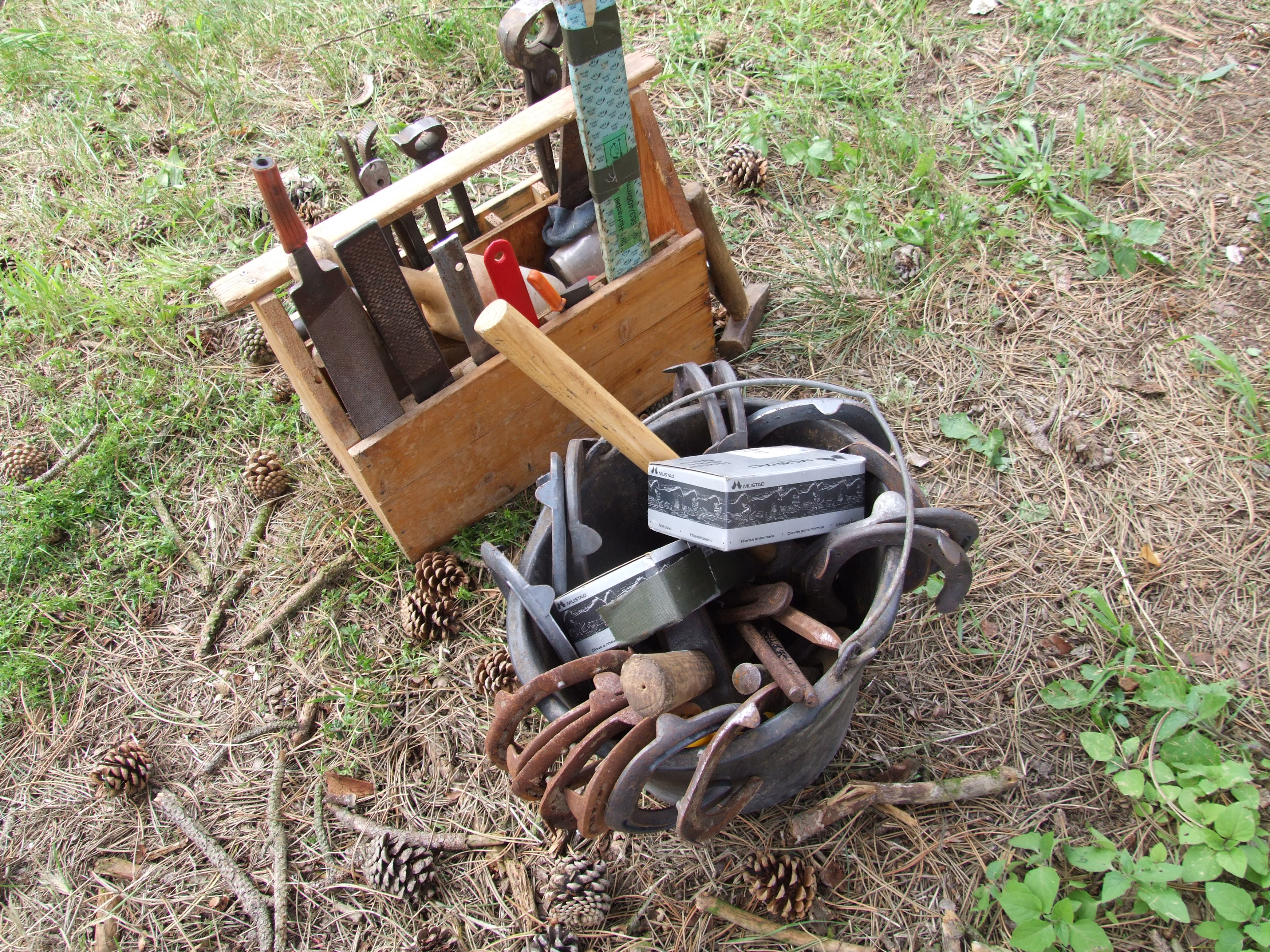 Werkzeug eines Hufschmiedes, tools of a farrier